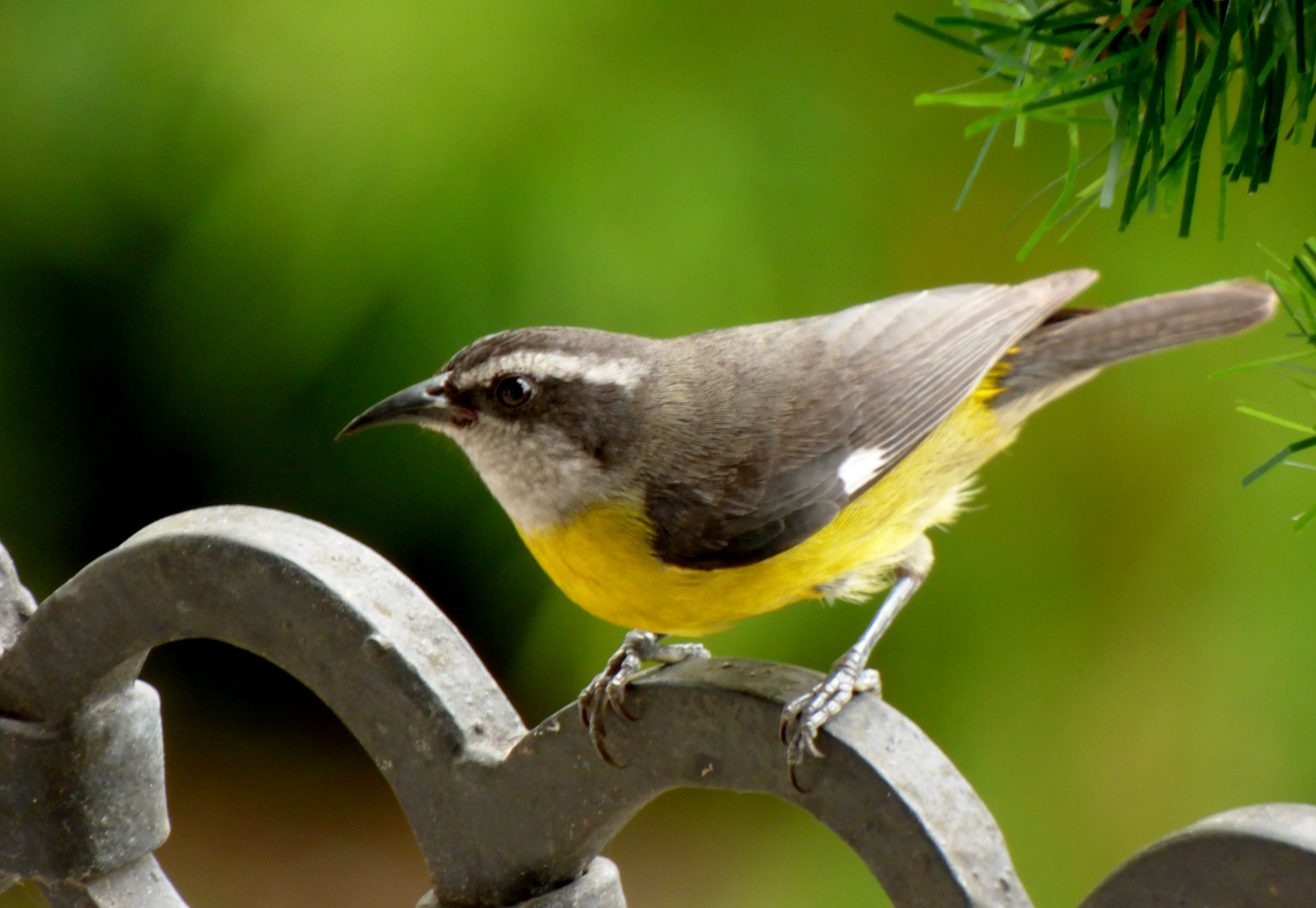 Coereba flaveola (Mielero común)